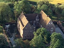 Wasserschloss in Hülsede, Landkreis Schaumburg, erbaut 1529-1548.